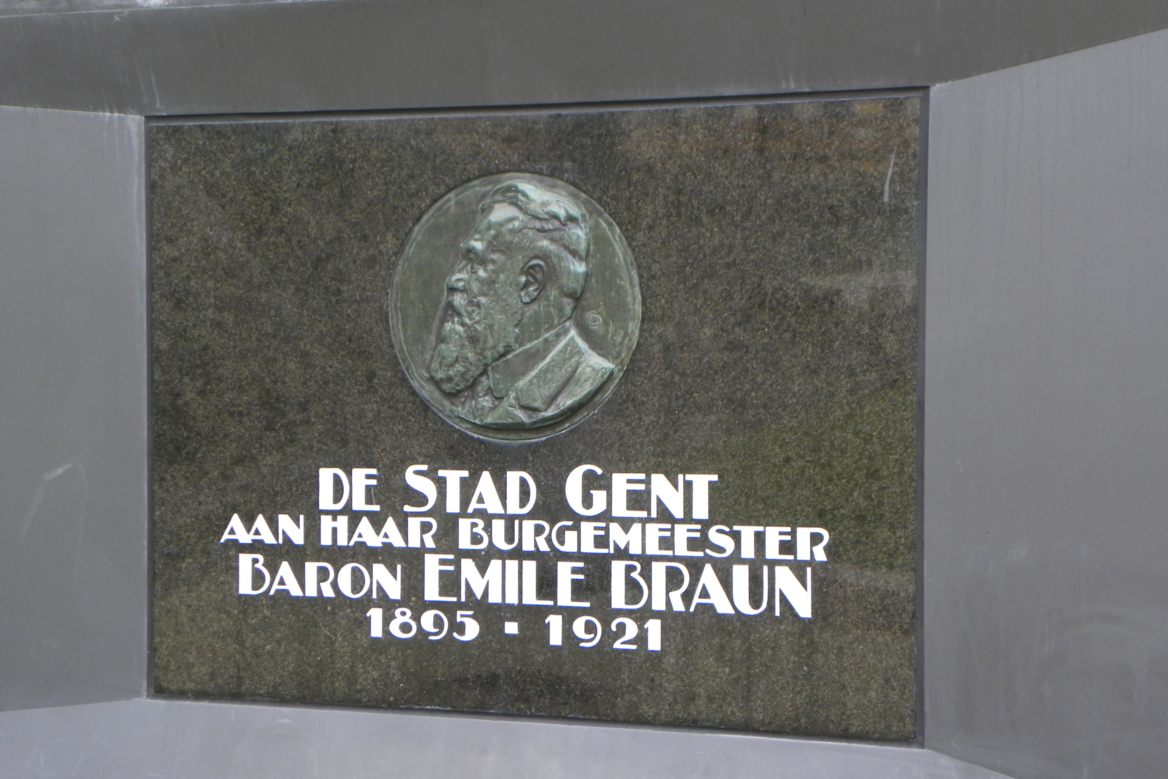 Médaillon en l'honneur d'Emile Braun (1849-1927) Bourgmestre de la Ville de Gand. Plaque commémorative fixée à la place "Emile Braun" entre le Beffroi et l'église St Nicolas. Originellement associé à la Fontaine des Agenouillés. Depuis la rénovation urbaine de 2012, se trouve (toujours place Emile Braun) dans le jardinet en face de la halle en bois.